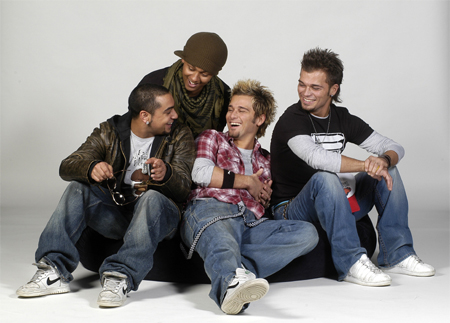 Foto's gemaakt door vriendin en fotografe Laura Oldenbroek heeft toestemming verleend voor het plaatsen van de foto.